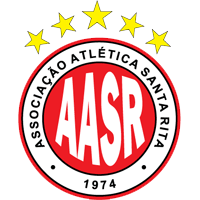 Logo: Associação Atlética Santa Rita, Boca da Mata (Alagoas), Brazil.